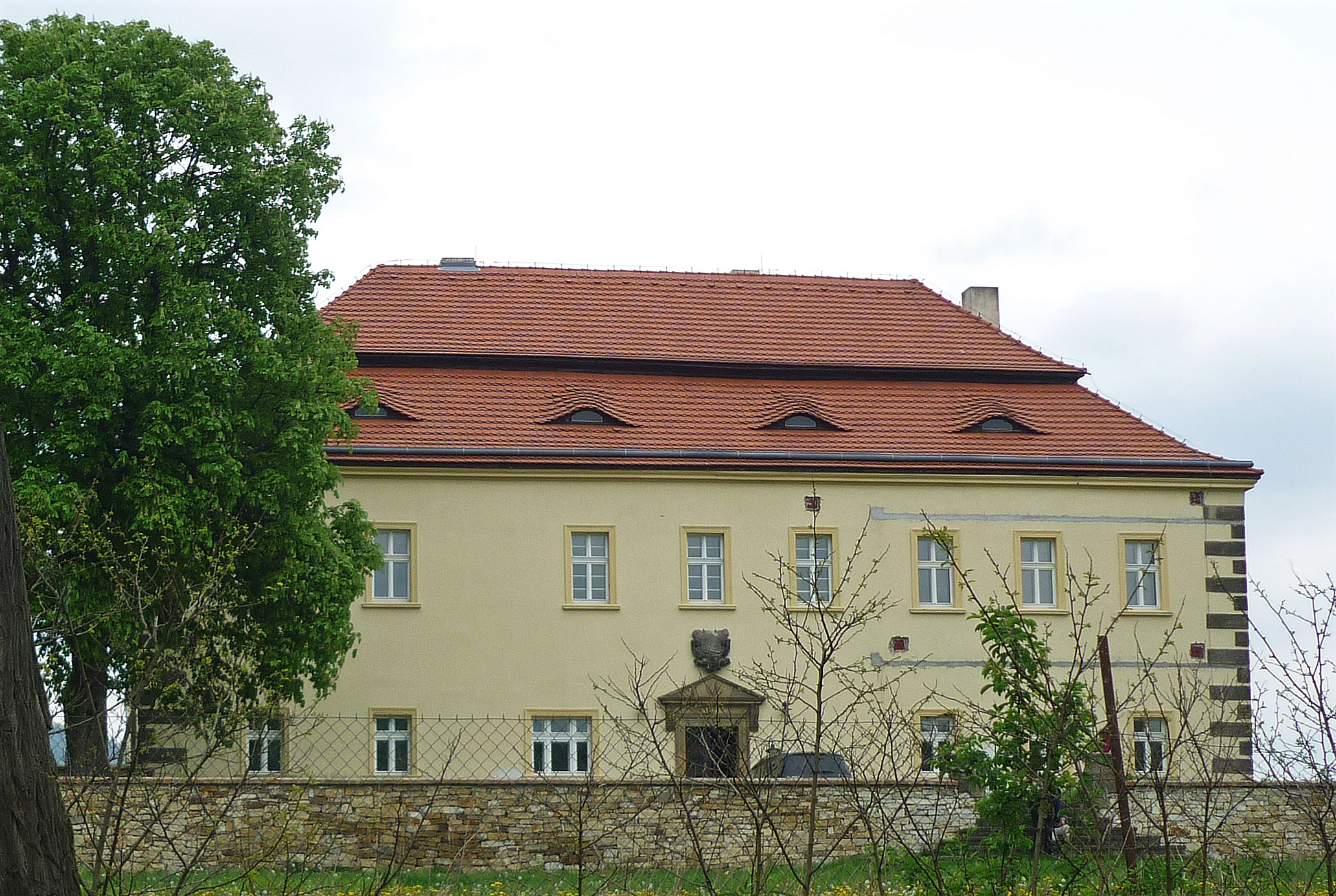 Schloss Libochowan (Libochovany) an der Elbe im Böhmischen Mittelgebirge